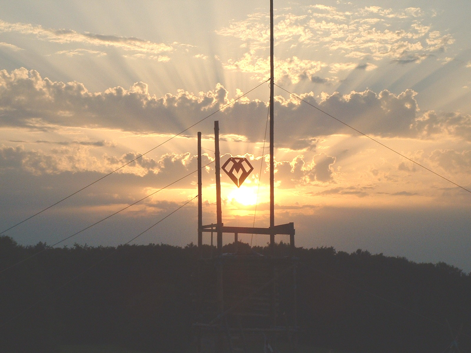 Das MC-Logo (Mennocamp, veranstaltet von der Mennoniten-Brüdergemeinde Oerlinghausen) im Schein der untergehenden Sonne